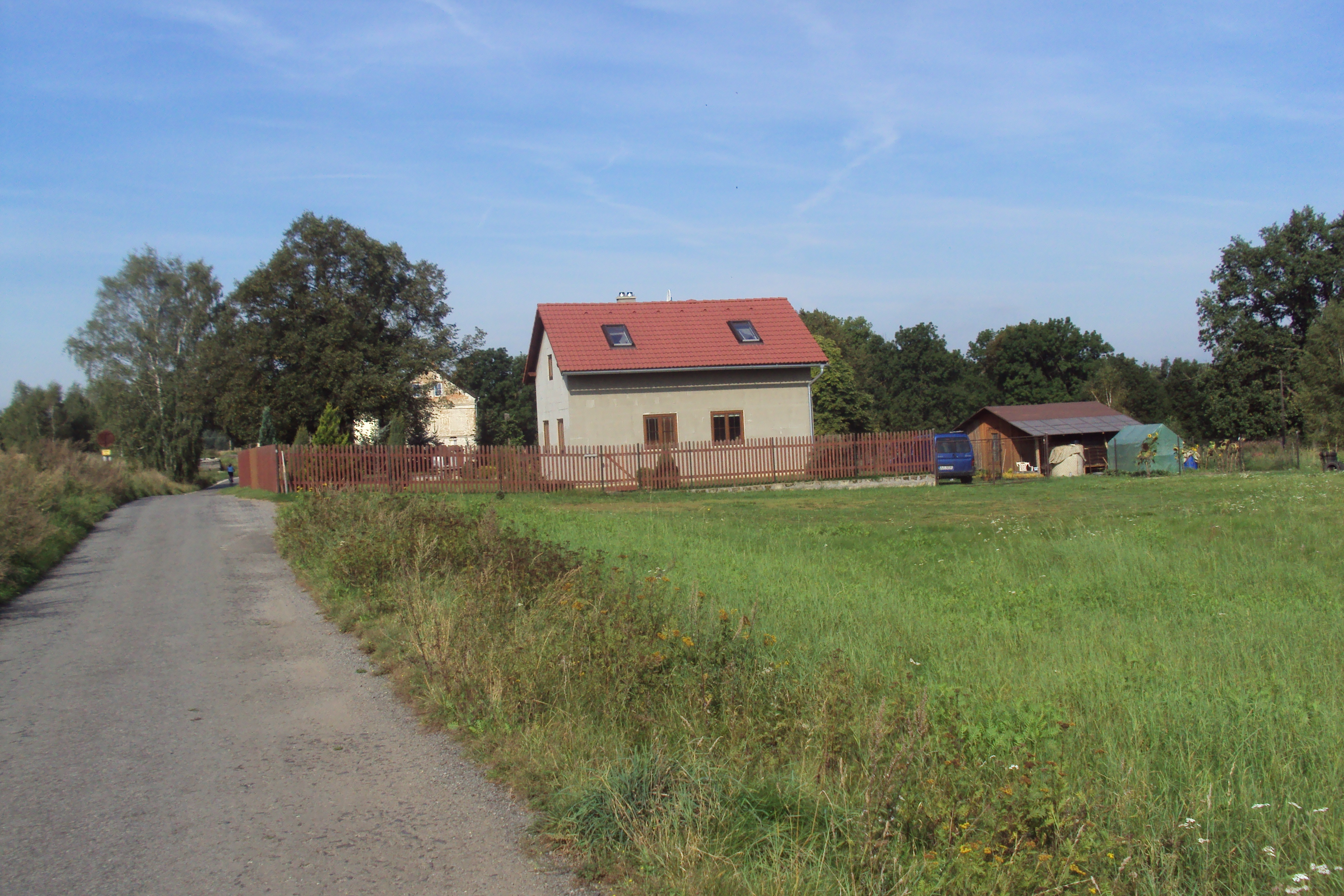 Domky v osadě Veselí na Zákupsku